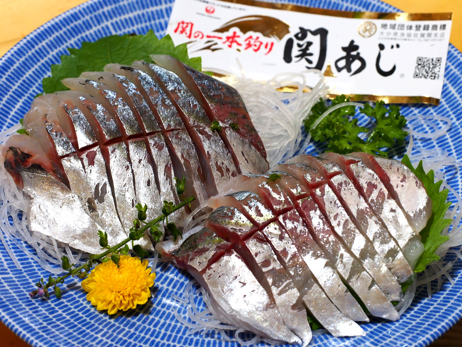 関あじの刺身（大分県大分市佐賀関産）